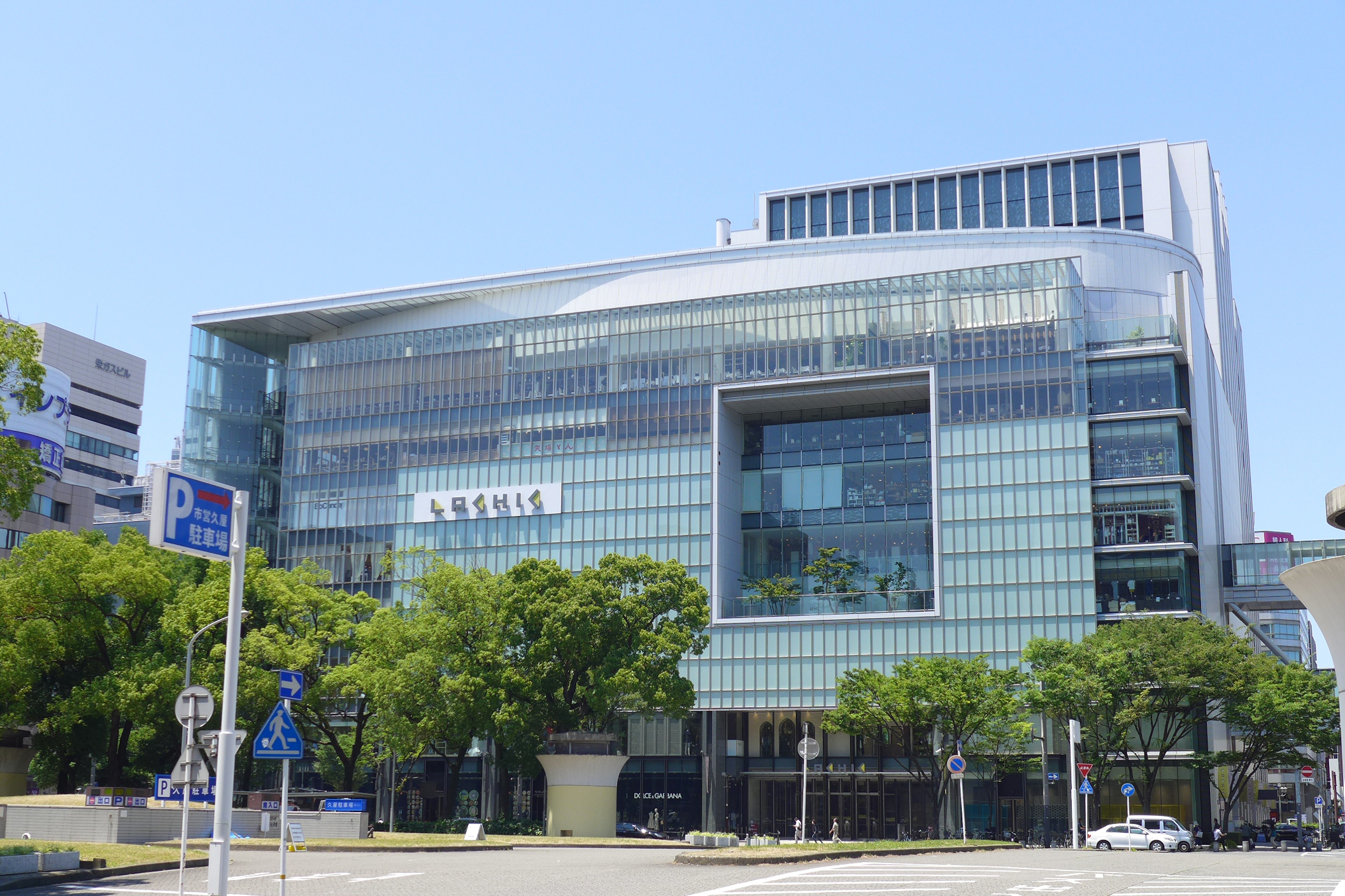 LACHIC